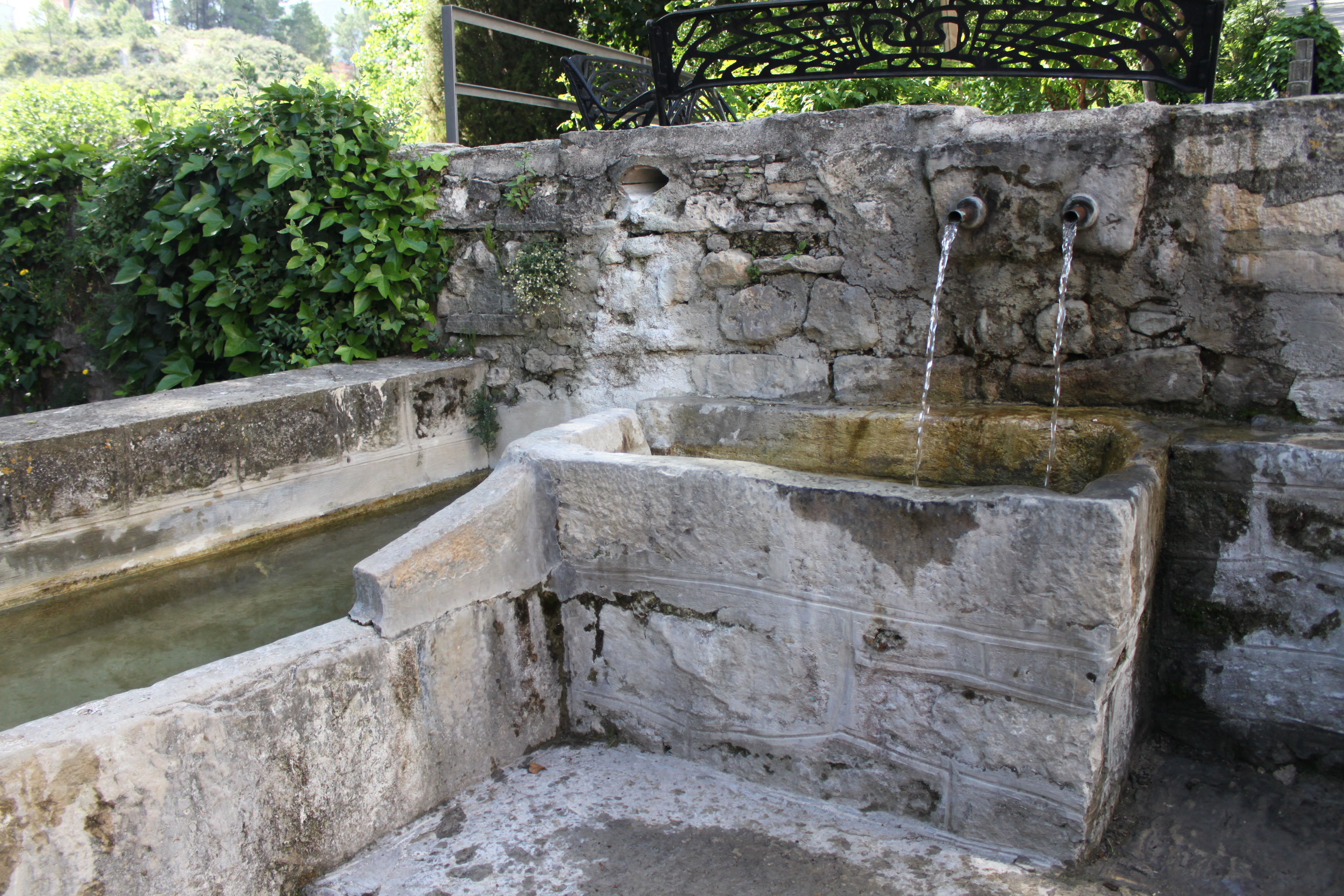 Font Nova en Planes, Alicante, Comunidad Valenciana, España